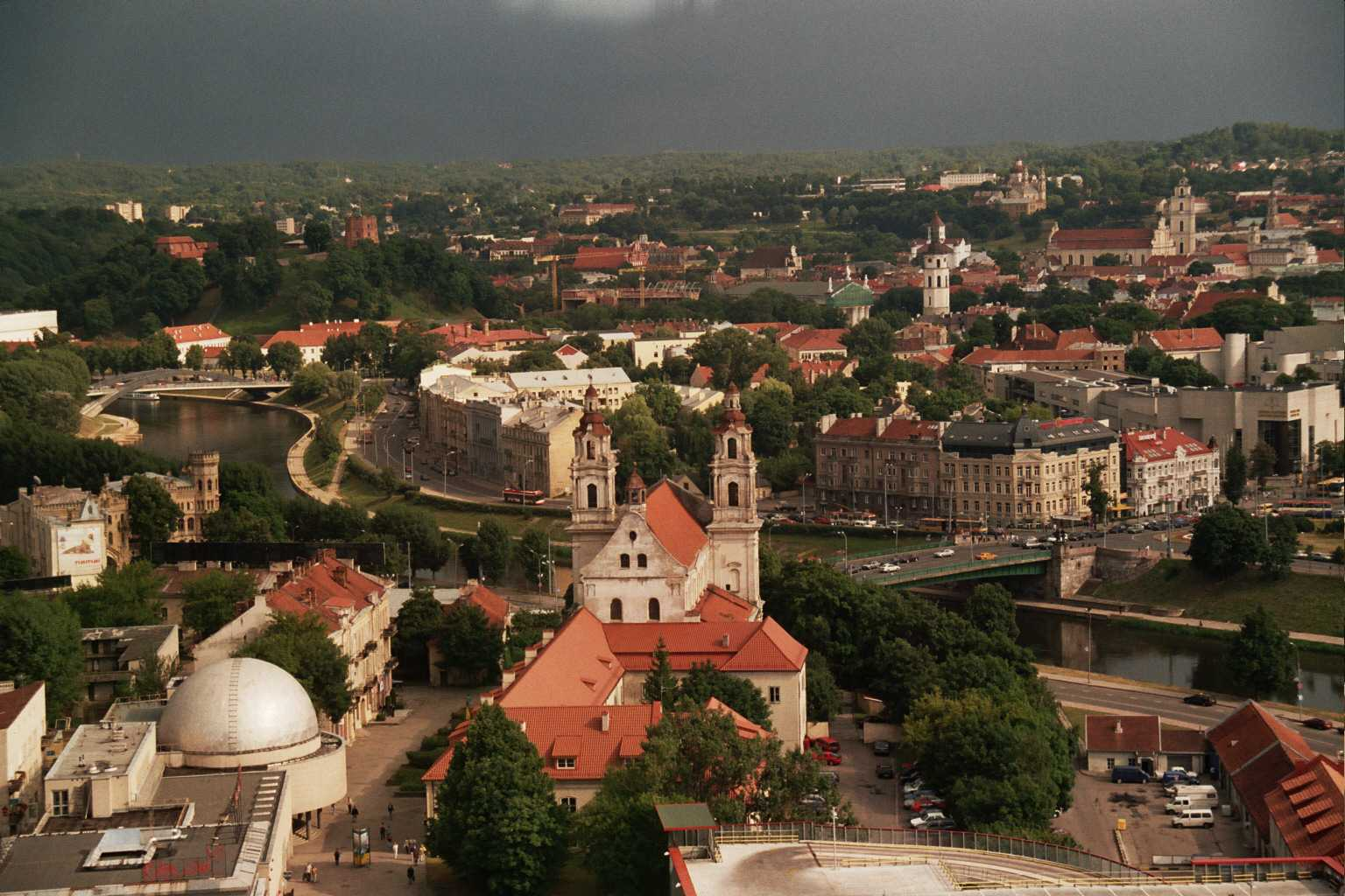 Mi faris tiun foton.